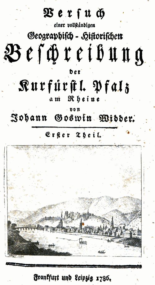 Johann Goswin Widder, Titelblatt seiner Pfalzbeschreibung, 1. Band, mit Stich von Heidelberg